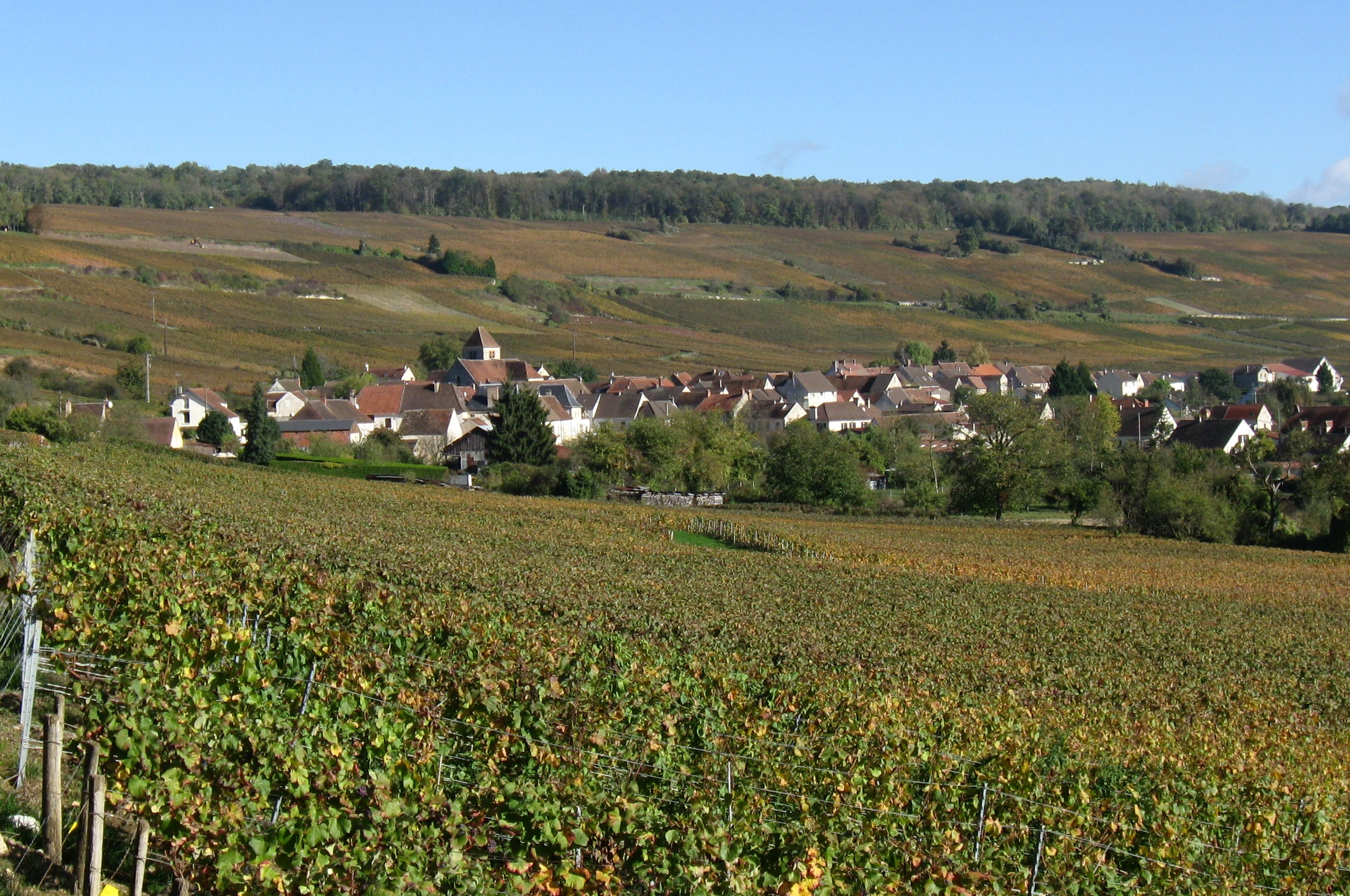 Bonneil. (département de l'Aisne , région Picardie)